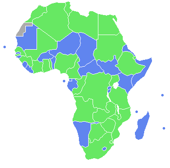 خريطة كرة قدم أفريقية